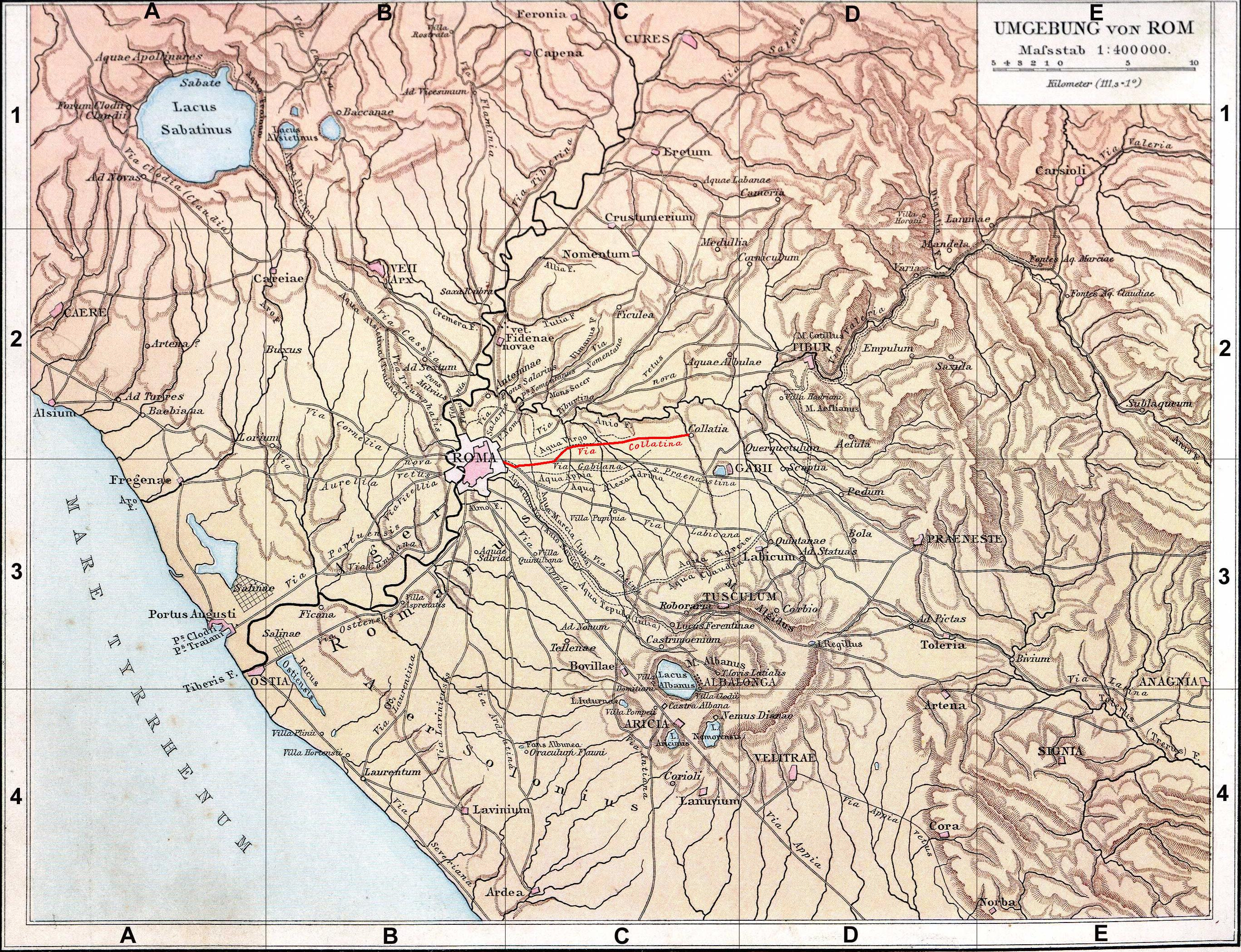 Fond de carte de 1886 (G. Droysens Allgemeiner Historischer Handatlas), libre de droit (Image:Rom_Umgebung.jpg), avec la voie Collatine en rouge.